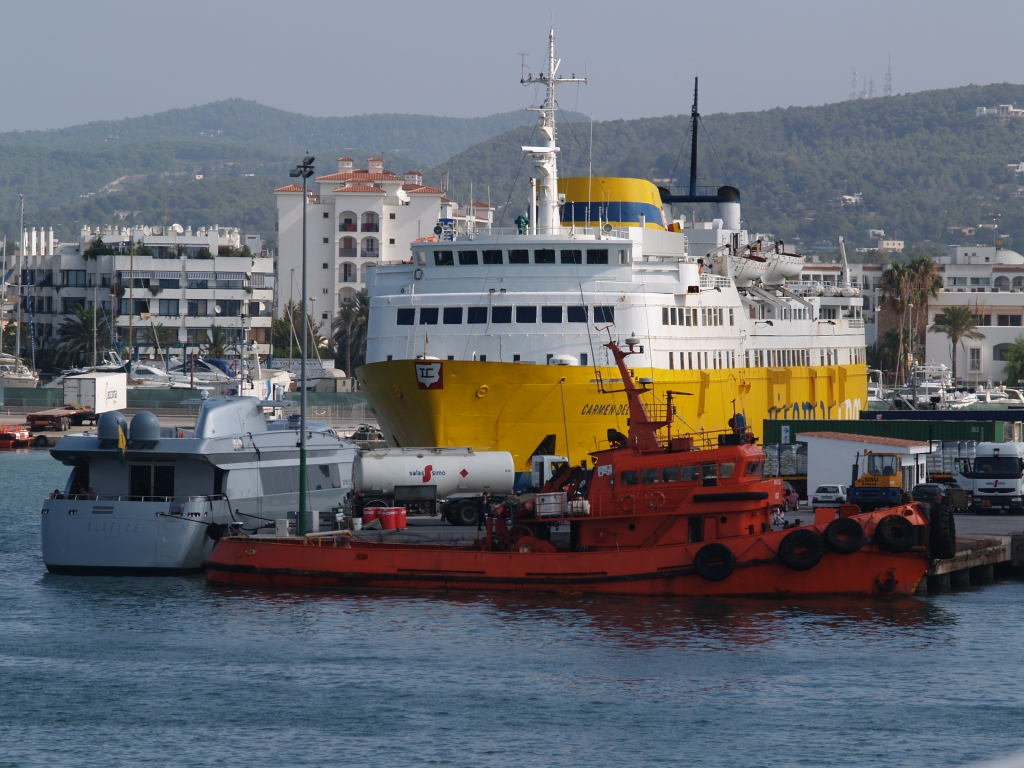 El barco Carmen del Mar en el puerto de Ibiza. Iscomar